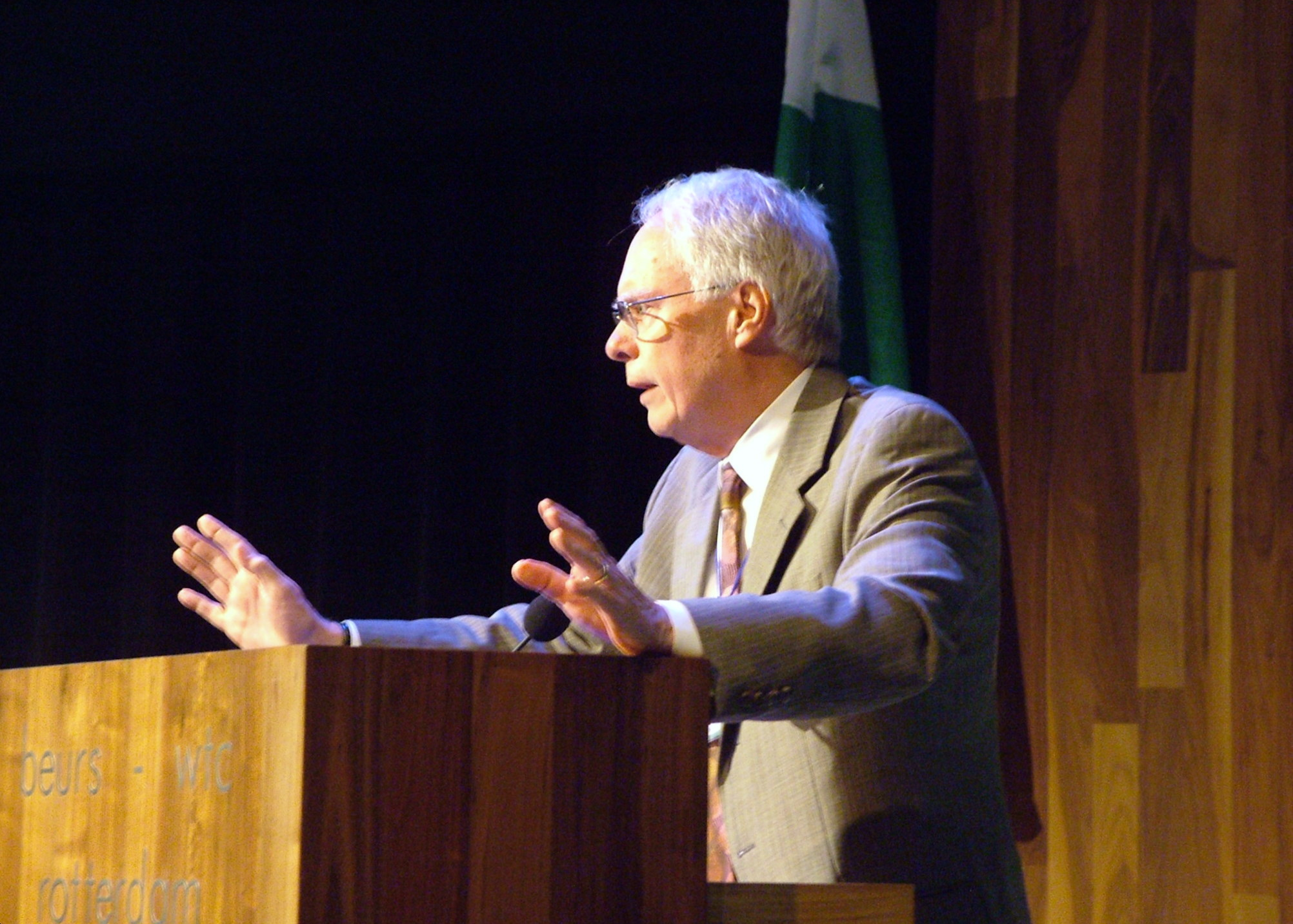 Universala Kongreso de Esperanto, Roterdamo 2008. "UEA centjara".